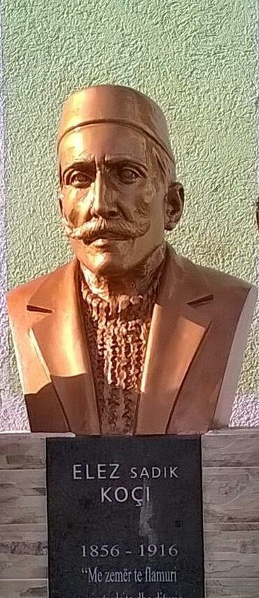 Bust of Elez Koçi.